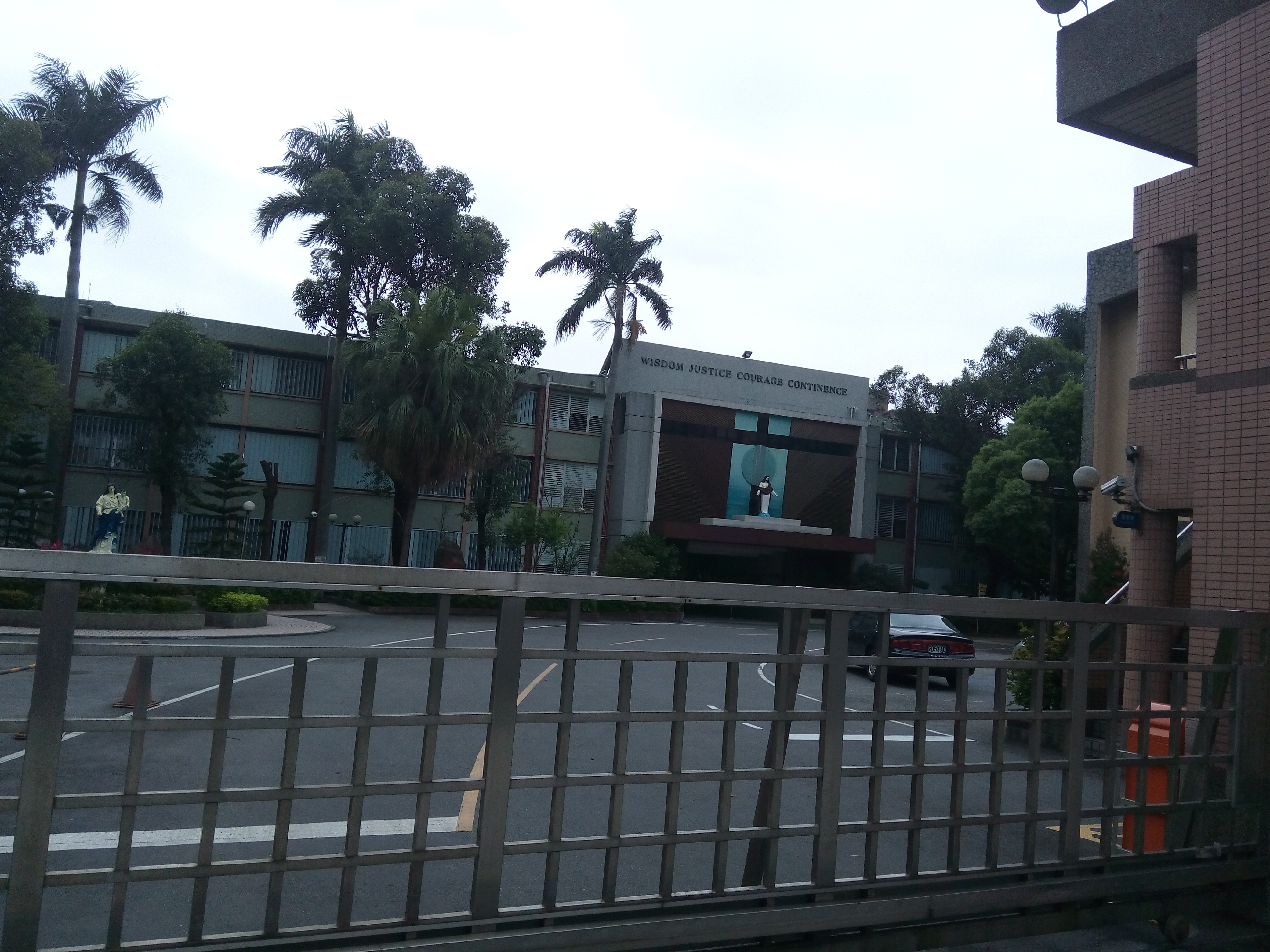 中文（台灣）: 恆毅中學大門